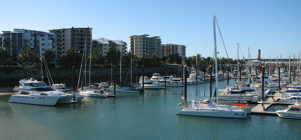 Mackay Marina